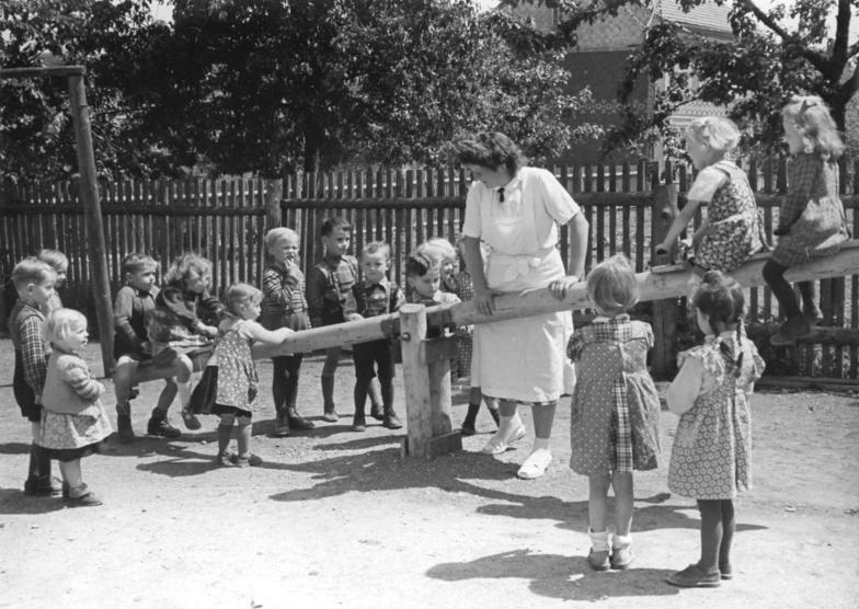 Thörey, Spielplatz des Erntekindergarten Zentralbild TBD-Wehse 19.6.1955 - 3018 - Erntekindergärten im Kreise Arnstadt In Thörey und in Hausen bei Arnstadt befinden sich Erntekindergärten, die es den arbeitenden Eltern ermöglichen, während der Erntezeit ihre Kinder gut unterzubringen. Beide Kindergärten wurden innerhalb des Nationalen Aufbauwerkes und mit Initiative der Eltern und des jeweiligen Bürgermeisters geschaffen und in diesem Jahr eröffnet. UBz: Im Erntekindergarten Hausen haben die Väter der Kinder eine Wippe gebaut. Unter Aufsicht der Kindergartenhelferin Marianne Beindorf sind die Kleinen in guter Obhut.